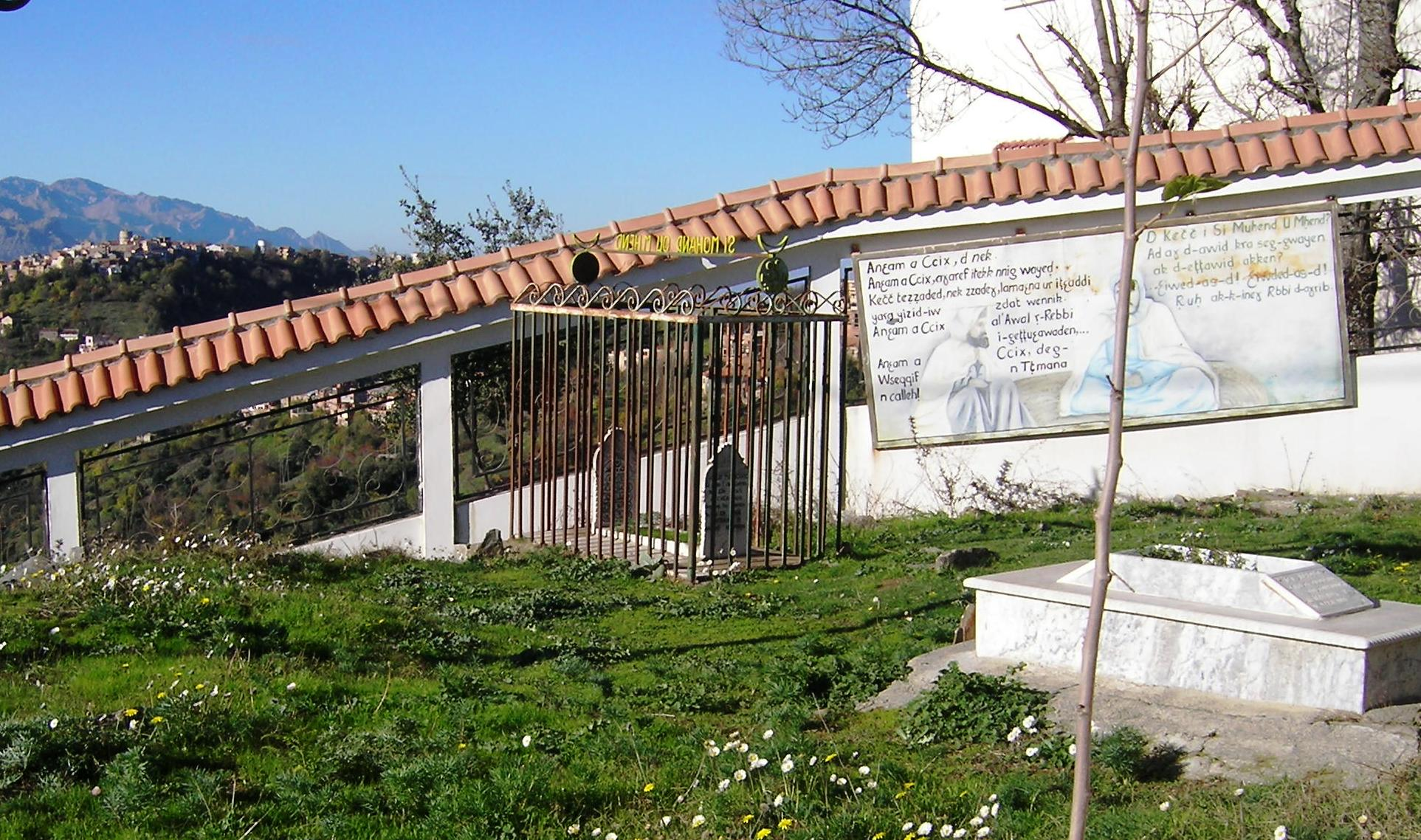 Tombe de Si Muhand U M'hand à Asqif n Tmana